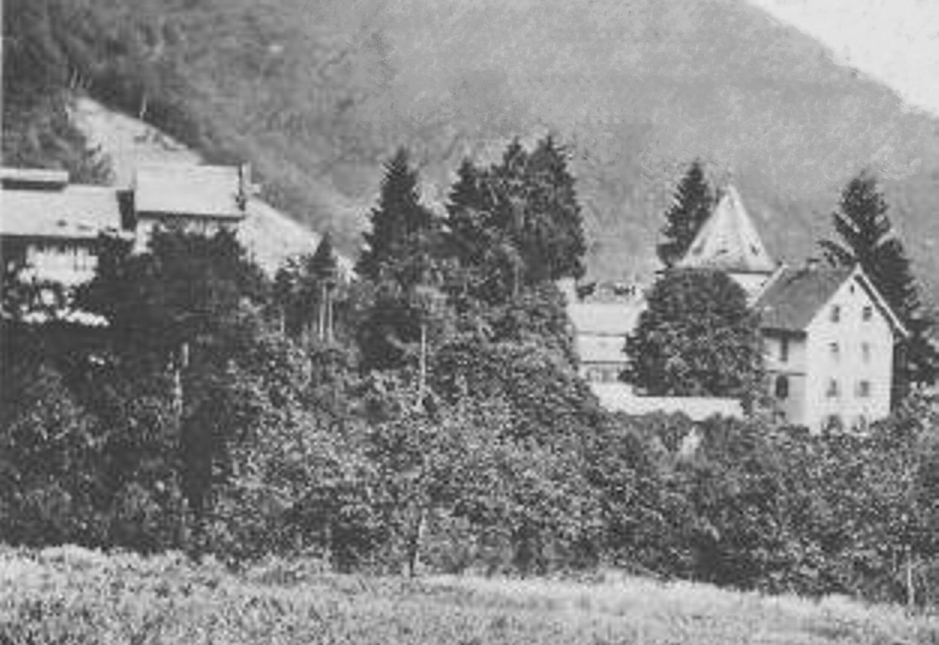 Kümmelbacher Hof 1903, links Brauerei; Neckargemünd, Deutschland